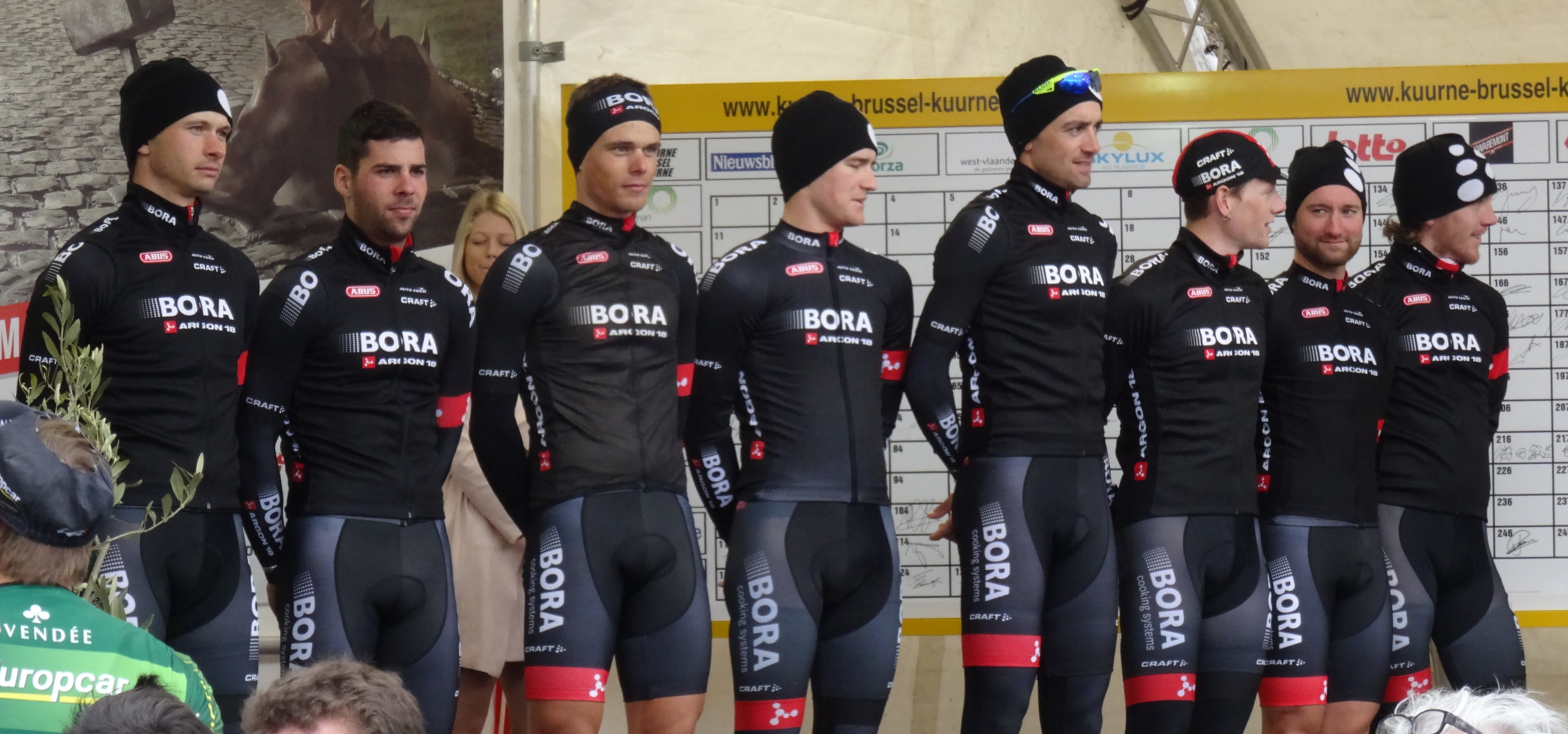 Reportage réalisé le dimanche 1er mars à l'occasion du départ et de l'arrivée de Kuurne-Bruxelles-Kuurne 2015 à Kuurne, Belgique.